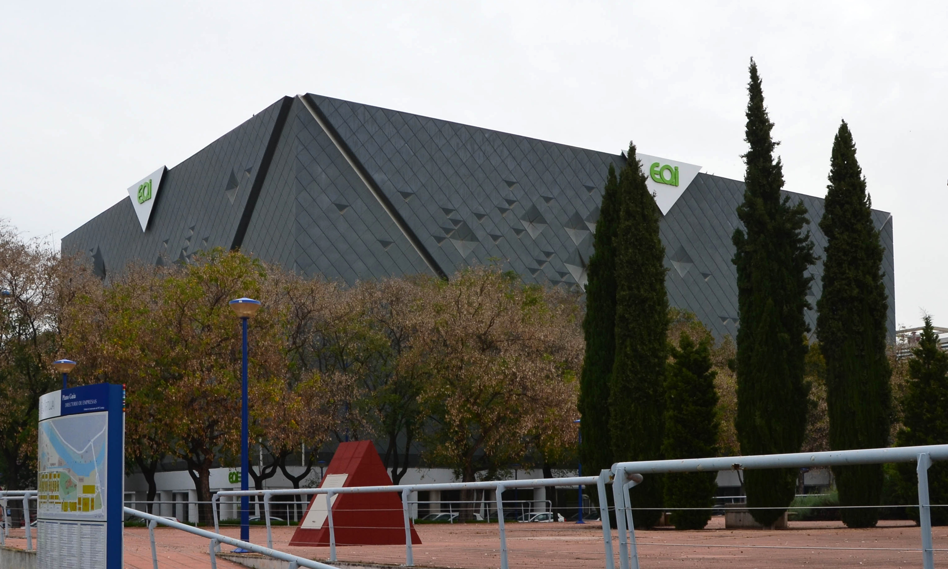 L'École d'Organisation Industrielle (EOI) de Séville (Espagne), école de commerce, ancien pavillon du Canada de l'Exposition universelle de 1992.